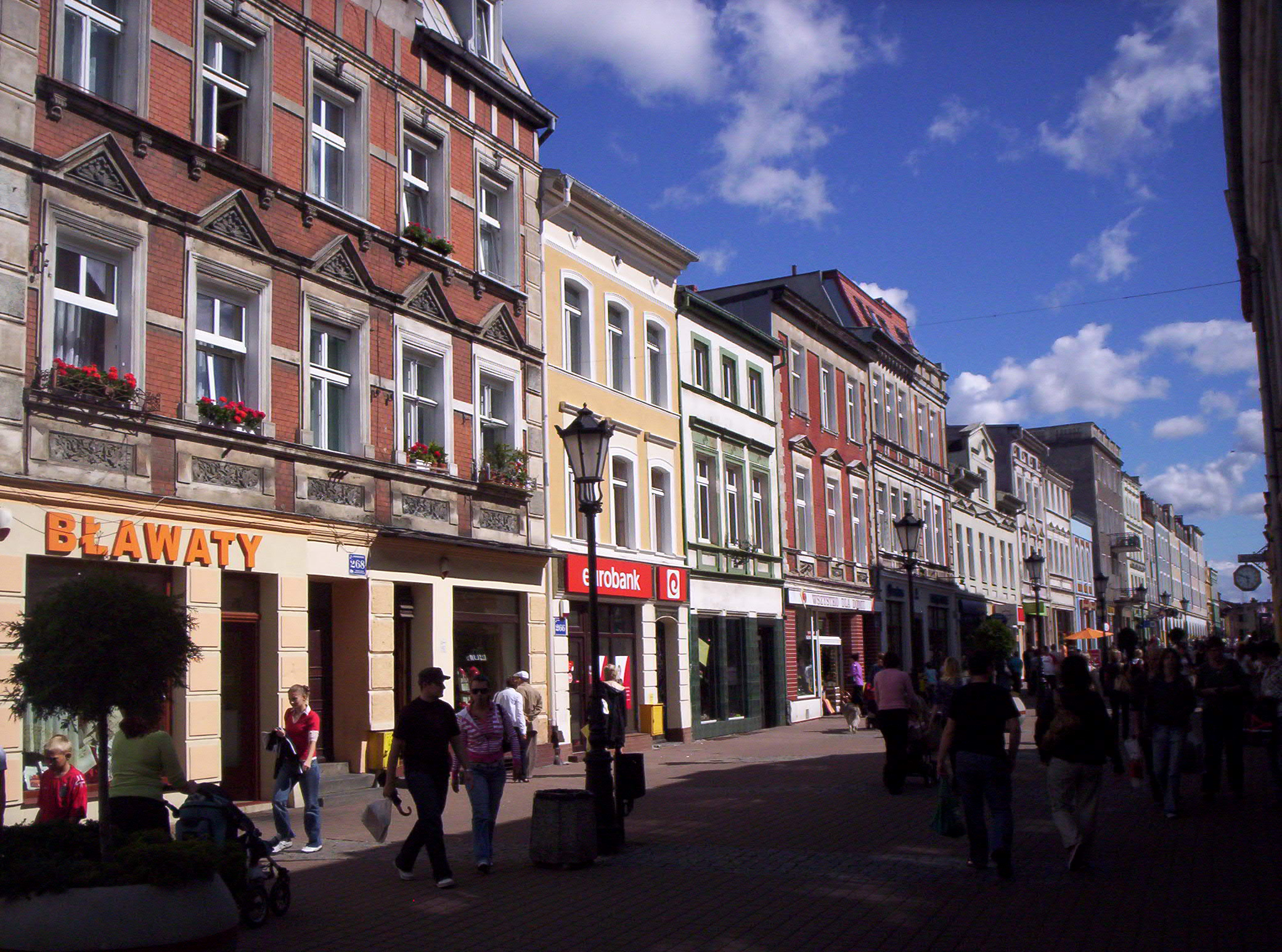 Deptak w Wejherowie, ul. Jana III Sobieskiego.